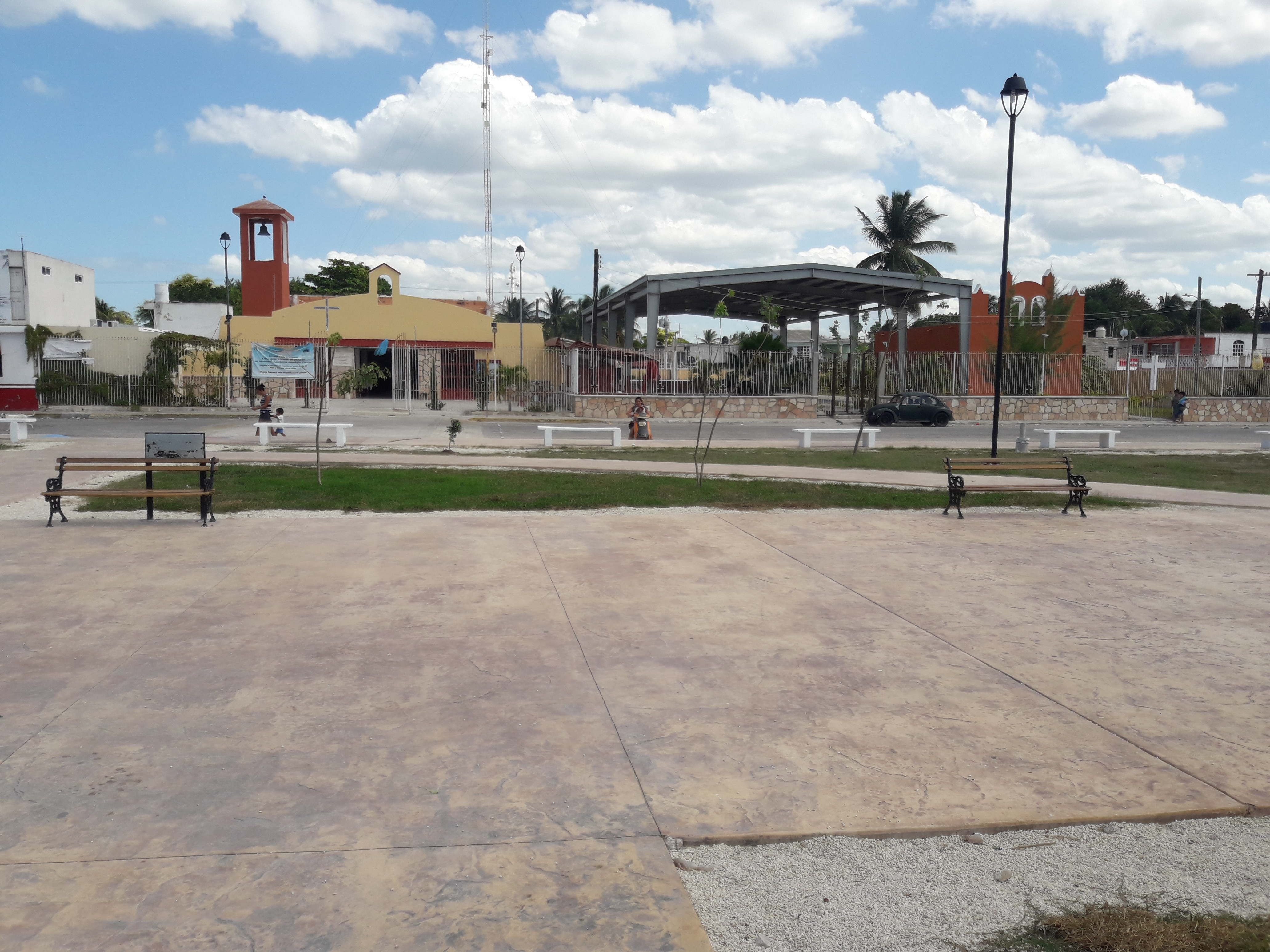 Por Raymundo Tziu Cuxim